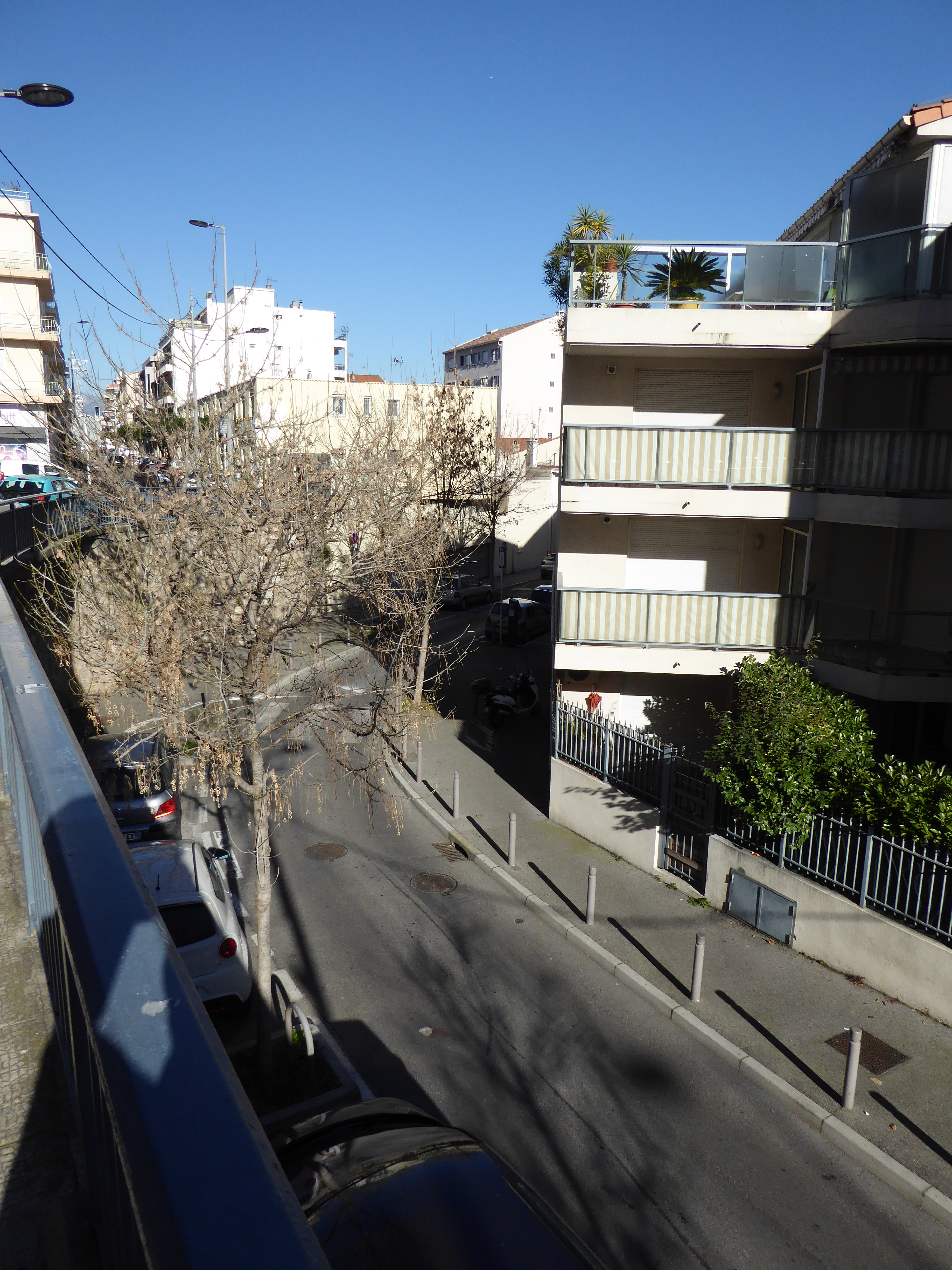 streets in Antibes